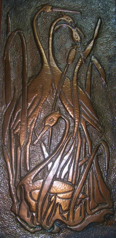 Mehmet Özdeveci bakır rölyef.